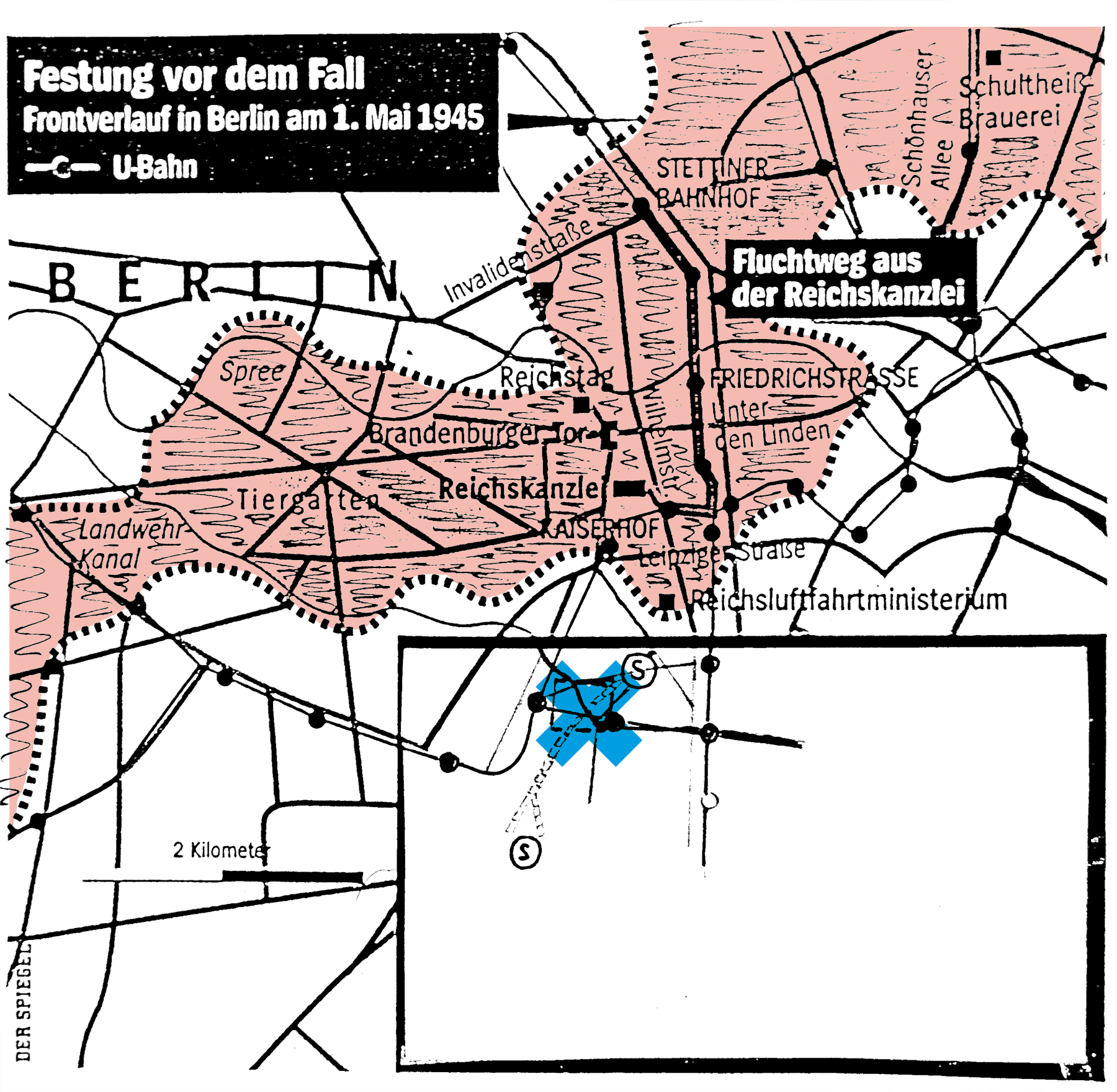 Festung vor dem Fall. Frontverlauf in Berlin am 1. Mai 1945